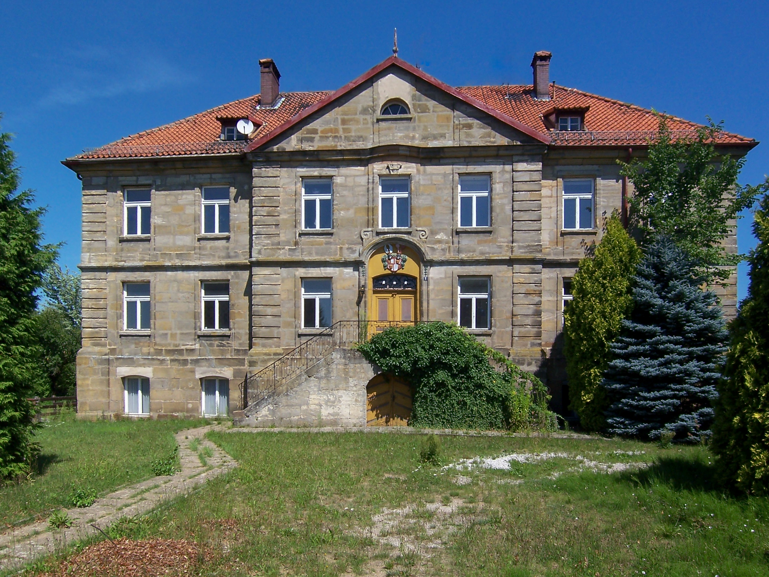 Vorderansicht des ehemaligen Rittergutes Schloß Büg